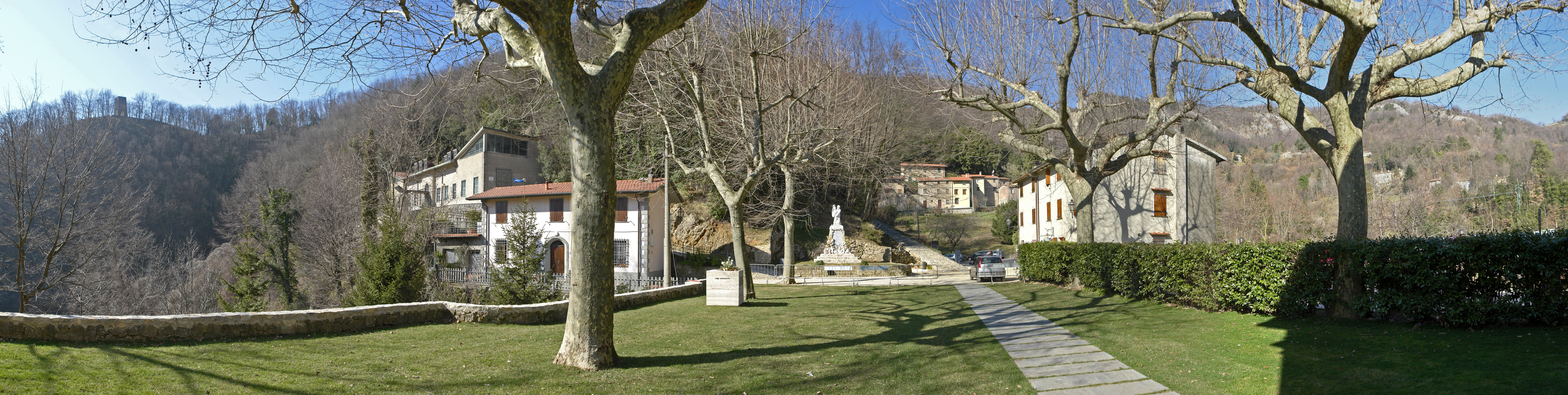 Sant' Anna di Stazzema, Blick von der Kirche